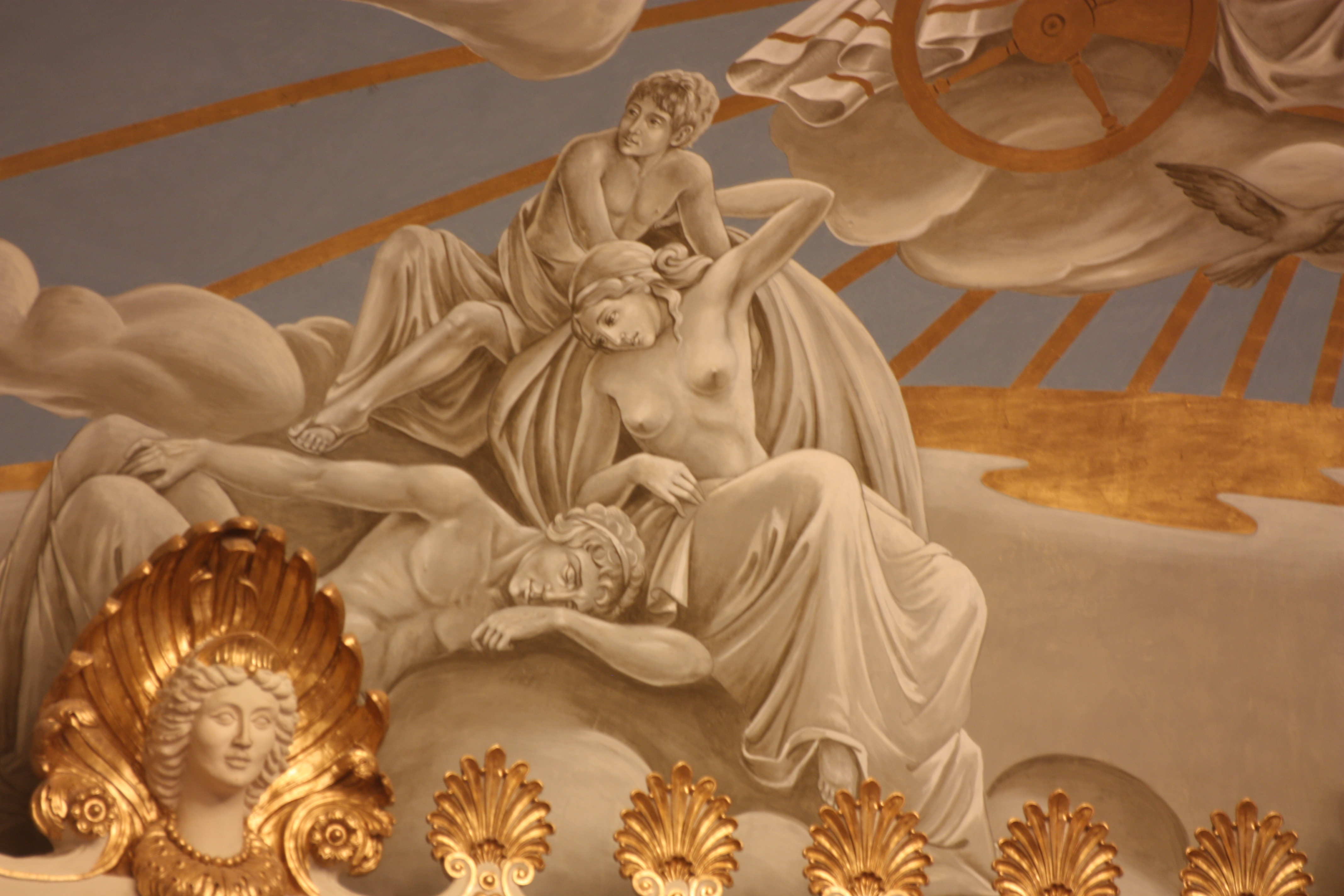 Selene und Endymion, dem Sonnenwagen folgend, im Wandgemälde über der Bühne des Friedrich von Thiersch Saal im Kurhaus Wiesbaden